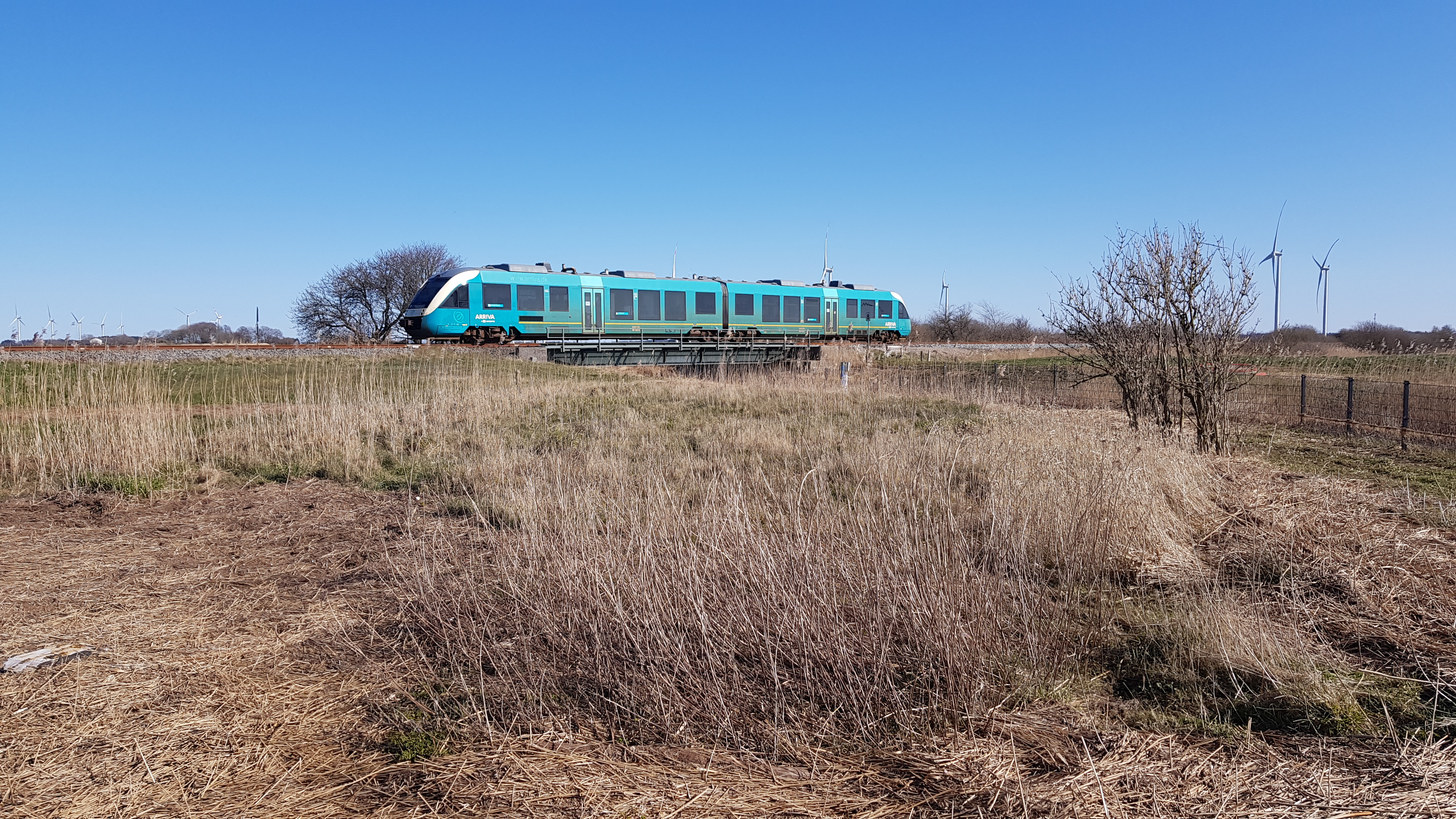 Et Arriva-tog mellem Tønder og Niebøl passerer den dansk-tyske grænse